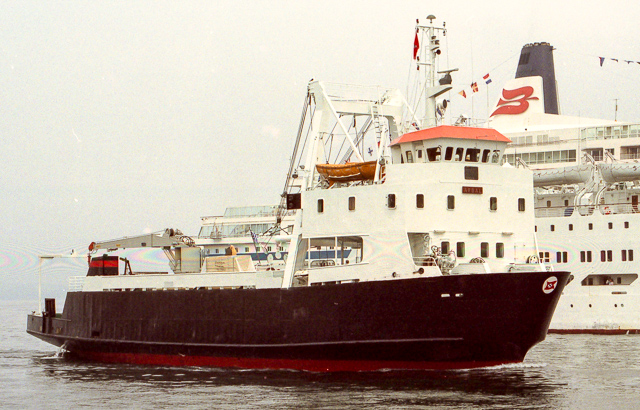 MS Årdal Fylkesbaatane Vågen Bergen